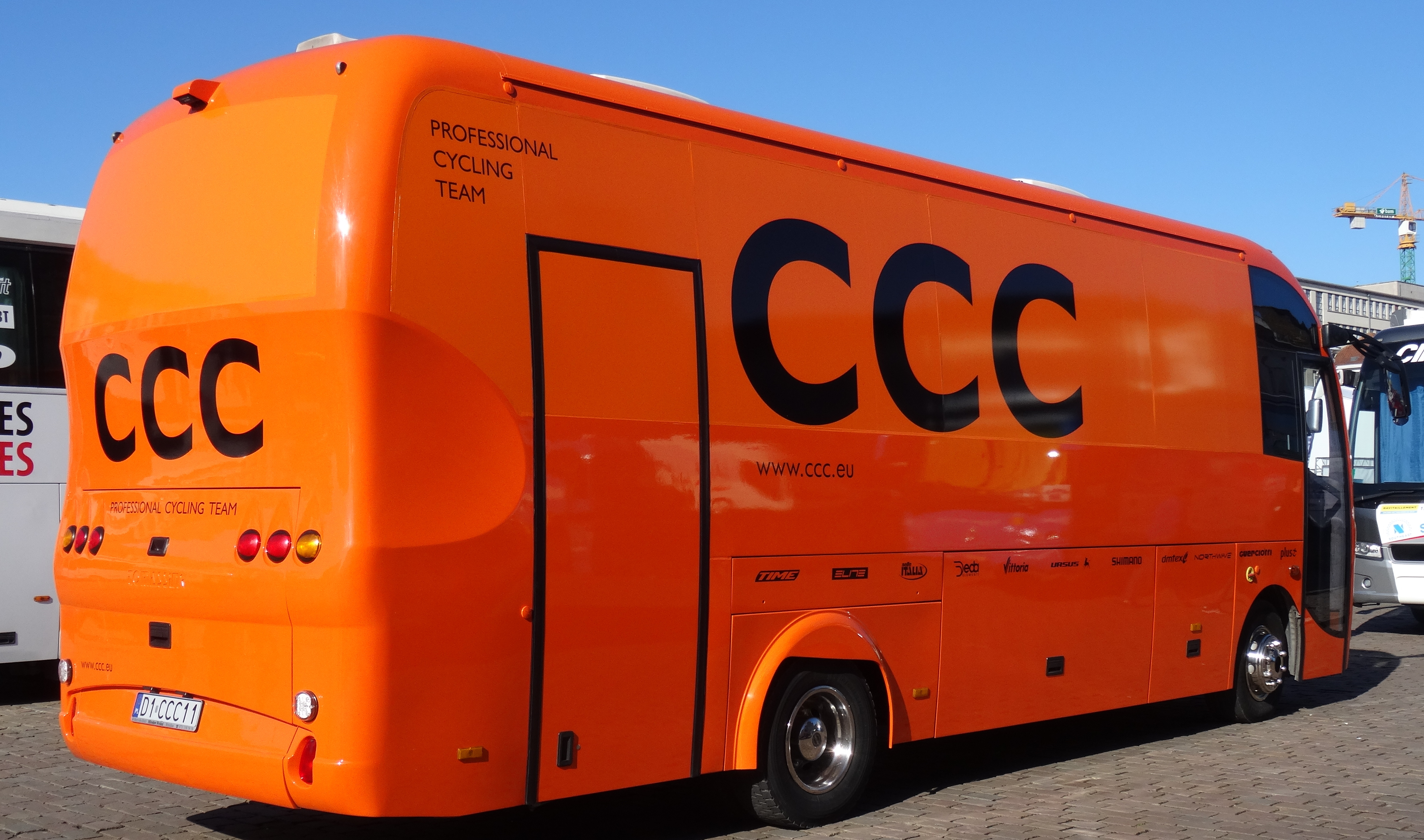 Reportage réalisé le samedi 28 février à l'occasion du départ et de l'arrivée du Circuit Het Nieuwsblad 2015 à Gand, Belgique.